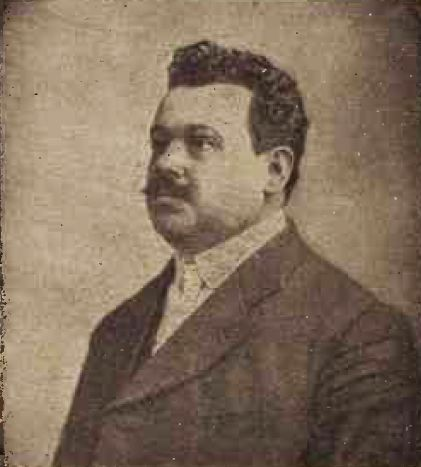 Titus Alexandrescu - președintele Societății Cercul artistic